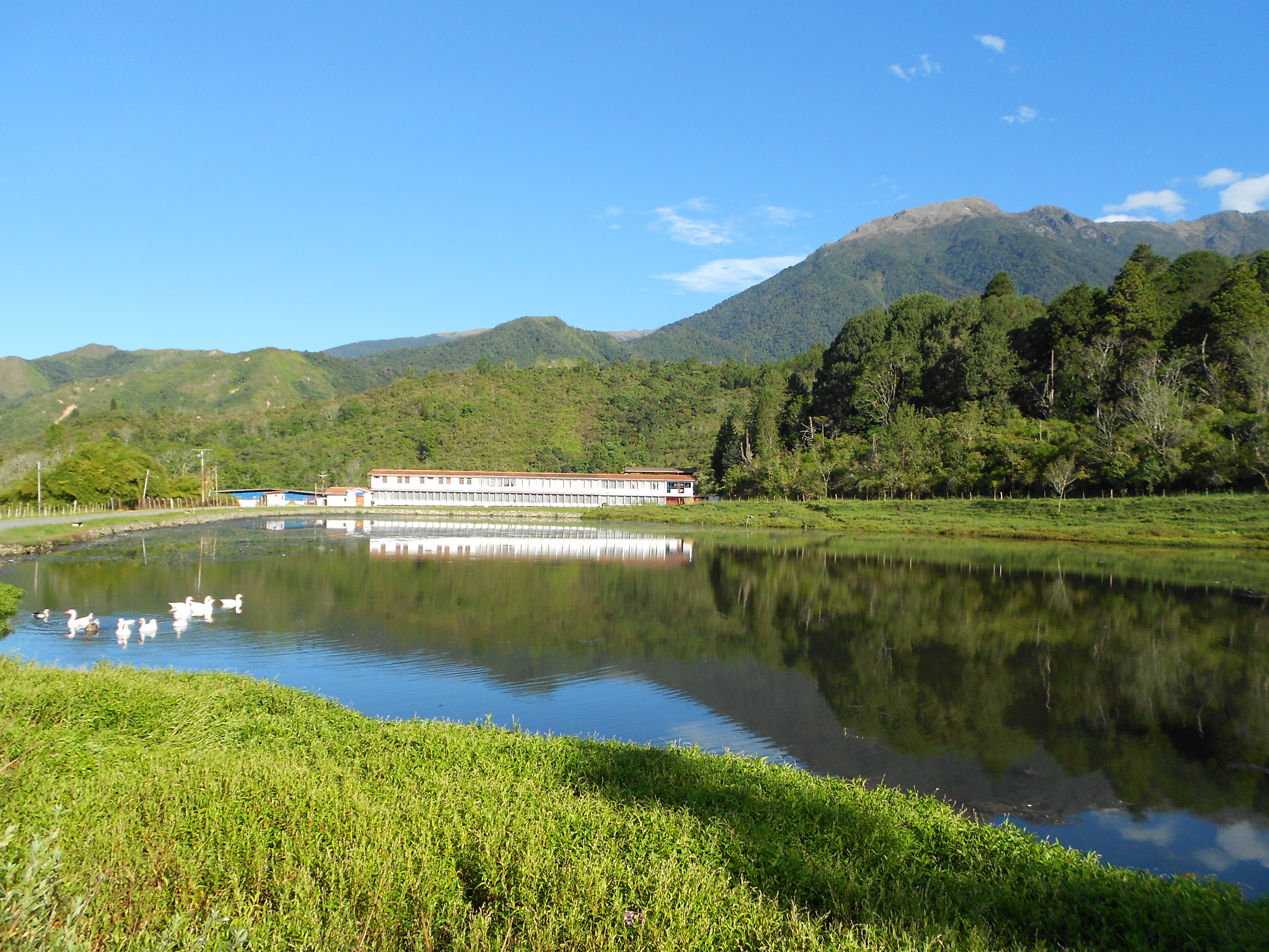 Distintas vistas del paisaje que se puede apreciar una simple mañana en El Valle, estado Mérida.